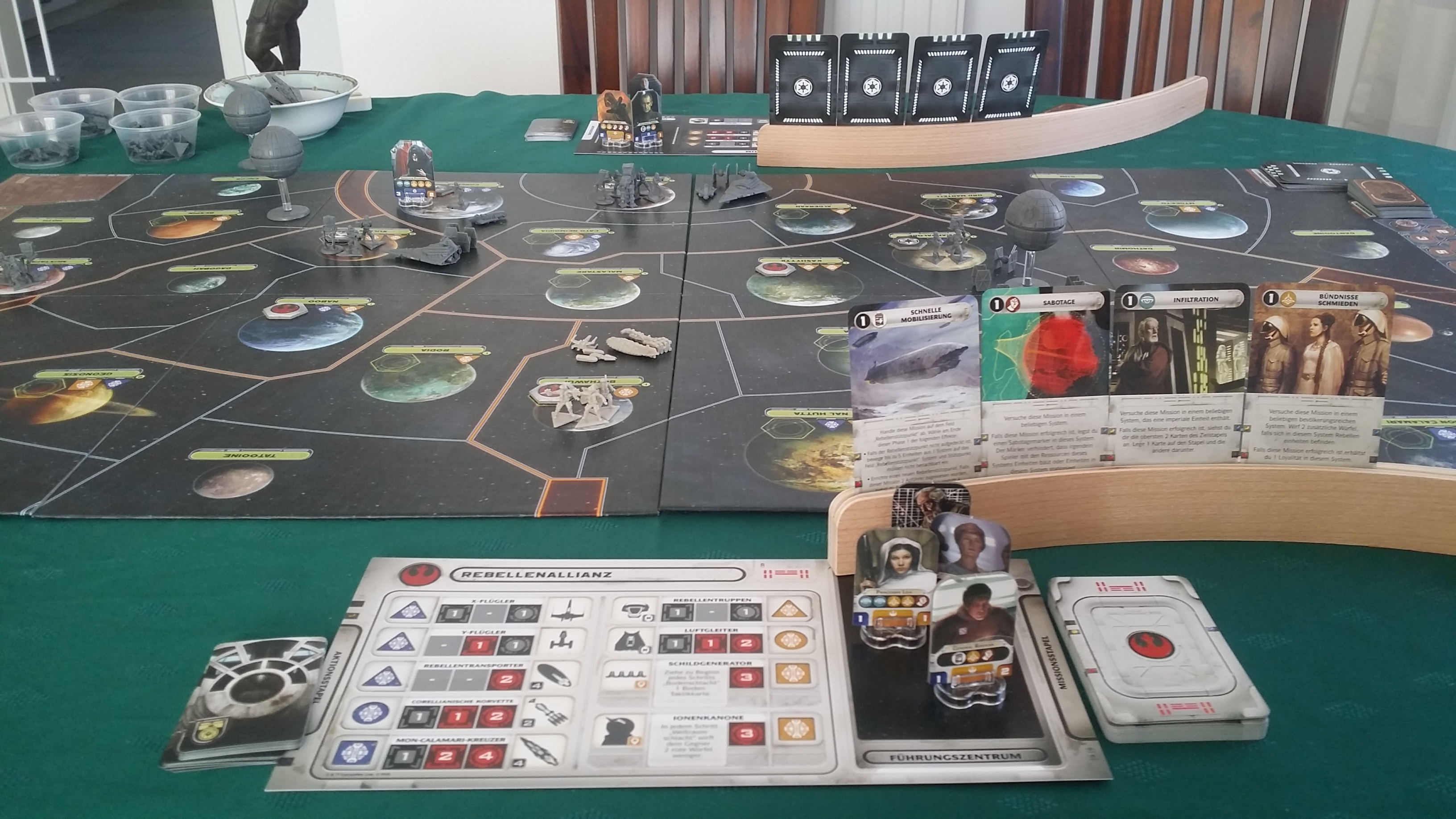 Star Wars: Rebellion Brettspiel 2016